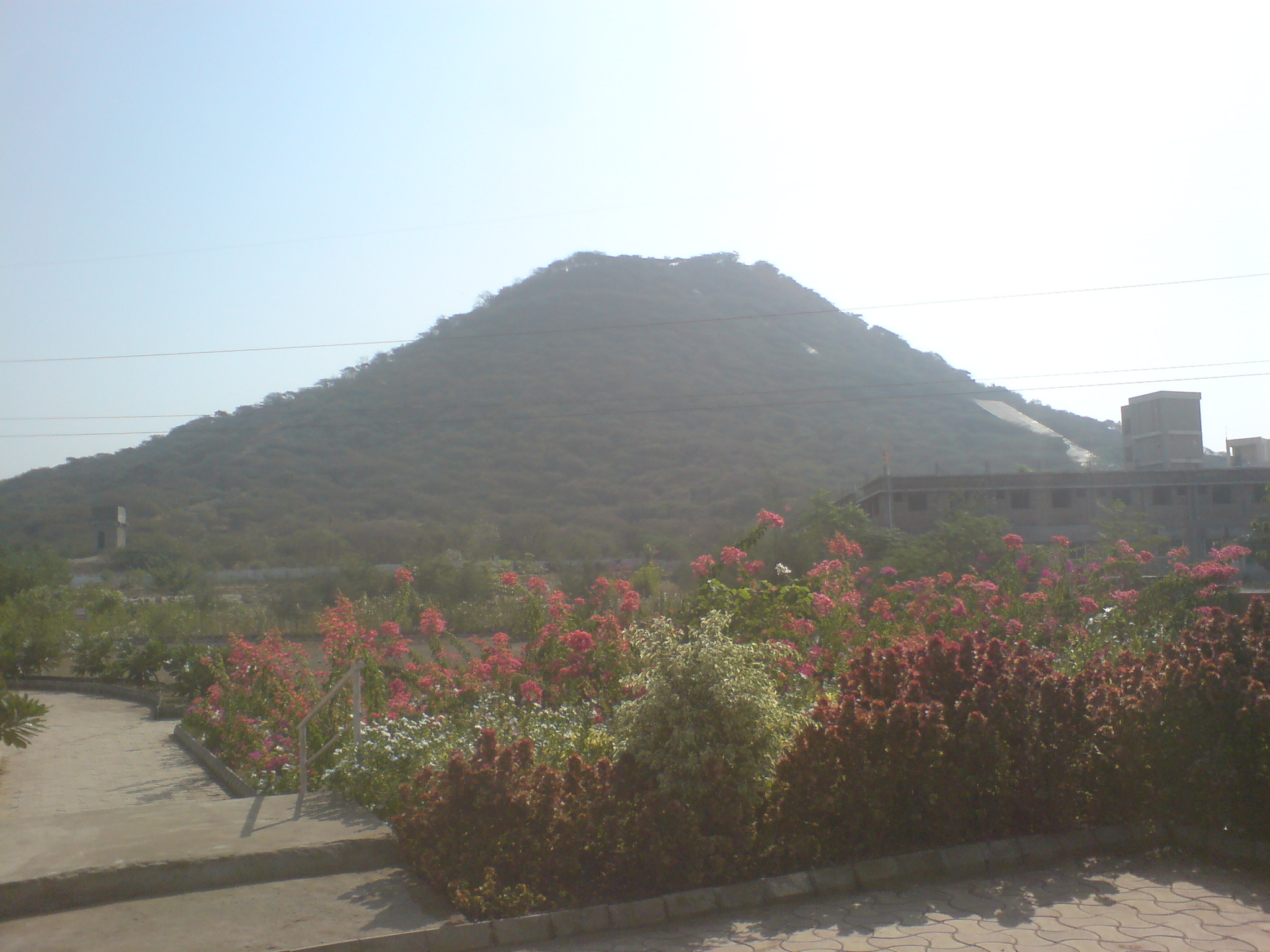 Bhaktivan Garden at Shri Chamunda Mataji Trust - Chotila (Dist.Rajkot,Gujarat,India)